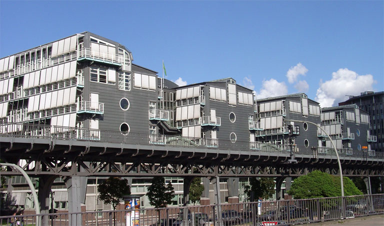 GNU-FDL, selbst fotografiert